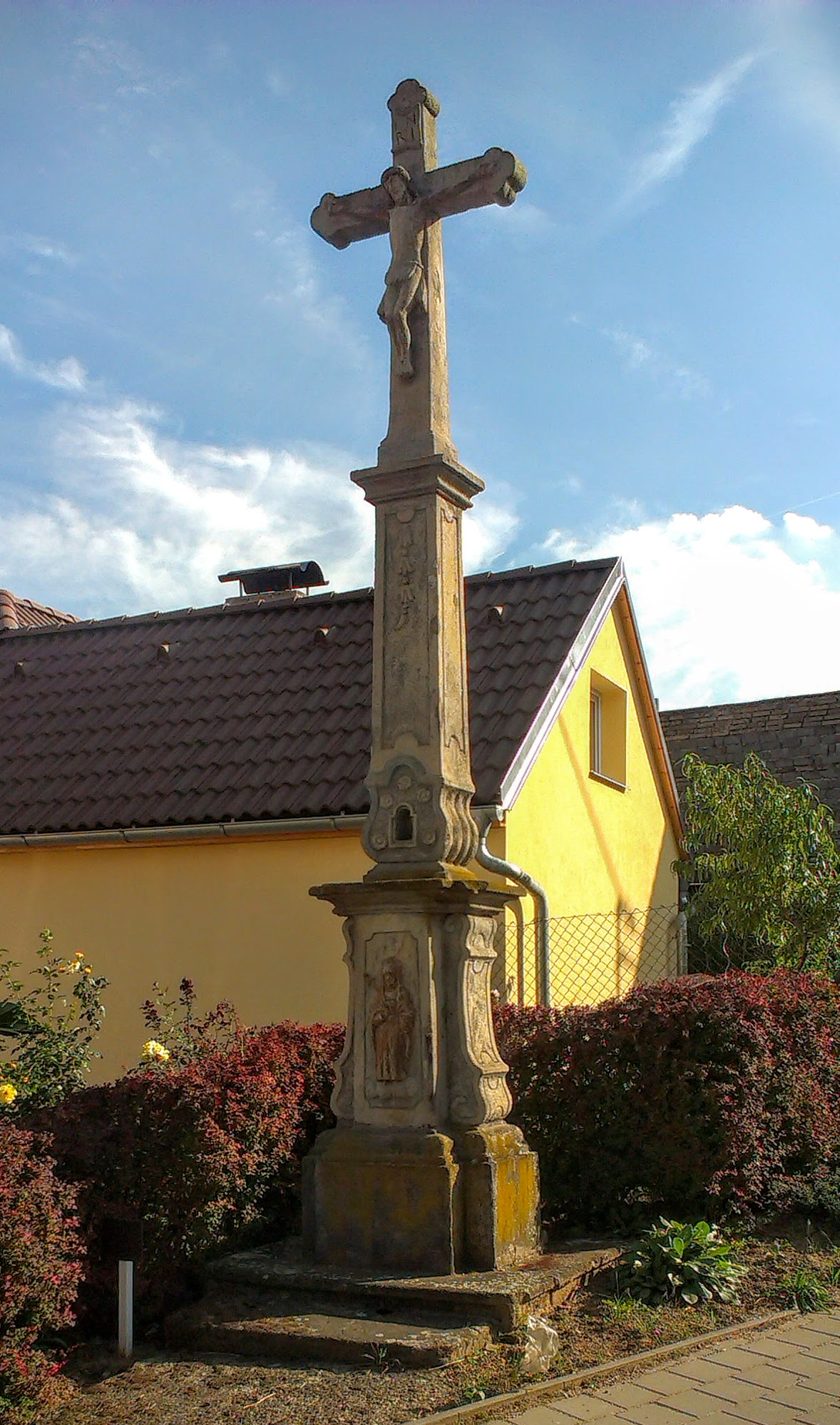 Kříž, Nětčice (Zdounky).